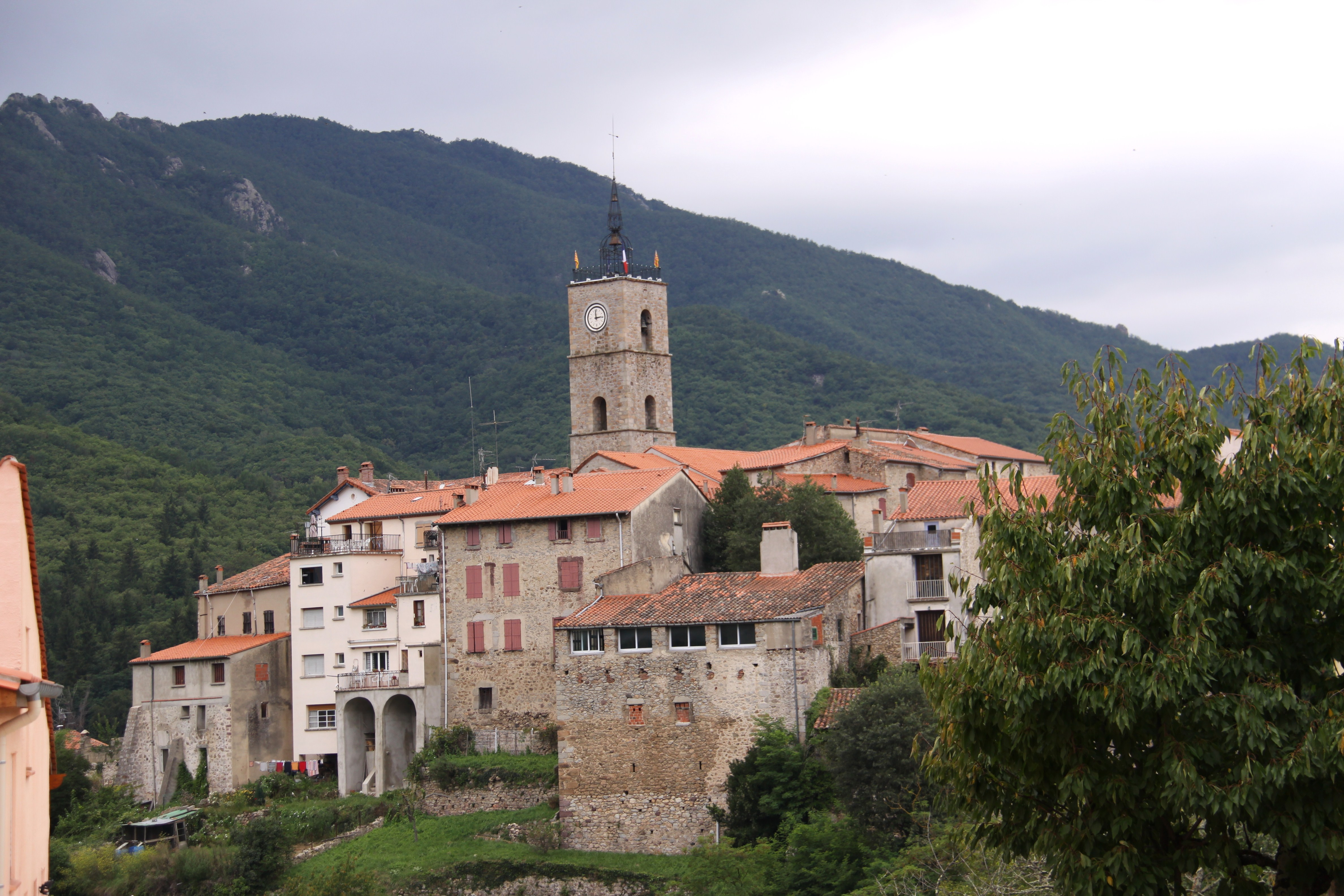 Très regroupée sur une hauteur, la partie historique de Saint-Laurent-de-Cerdans avec en son centre l' église. Saint-Laurent-de-Cerdans, Pyrénées-Orientales, France.